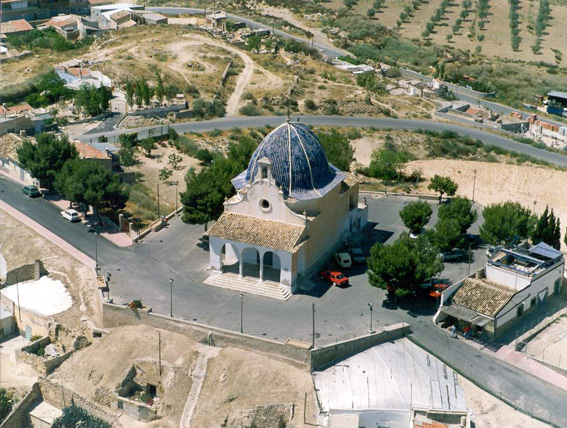 Ermita de Santa Bàrbara (Monòver, Vinalopó Mitjà, País Valencià)